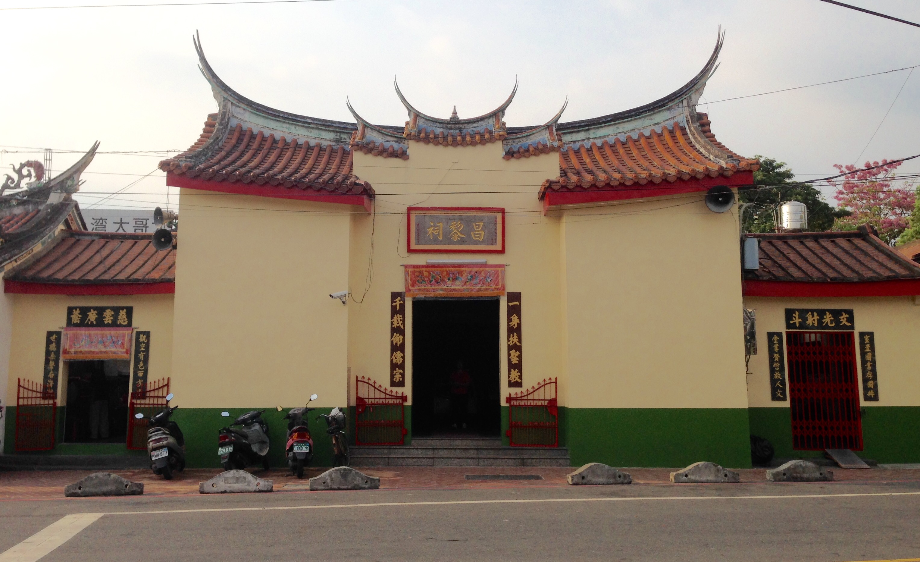 中文（台灣）: 內埔昌黎祠